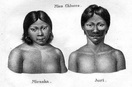 Miranha und Juri, zwei Jugendliche aus Südamerika, die im 19. Jh. nach München verschleppt wurden